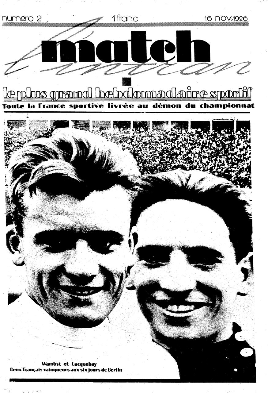 Couverture du magazine Match l'intran, n° 2, le 16 novembre 1926 avec Georges Wambst et Charles Lacquehay.